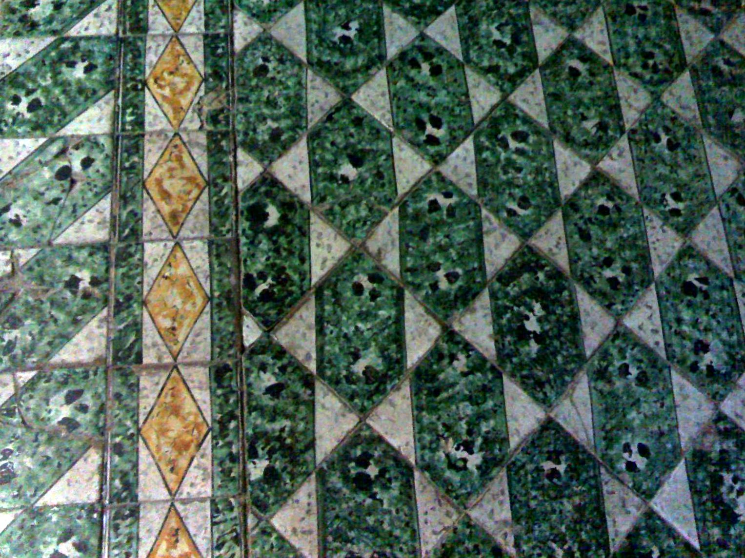 Chiesa di San Giovanni Maggiore di Napoli - Pavimento maiolicato della congrega dei Bianchi del Santissimo Sacramento